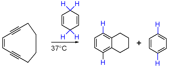 Bergman_ring